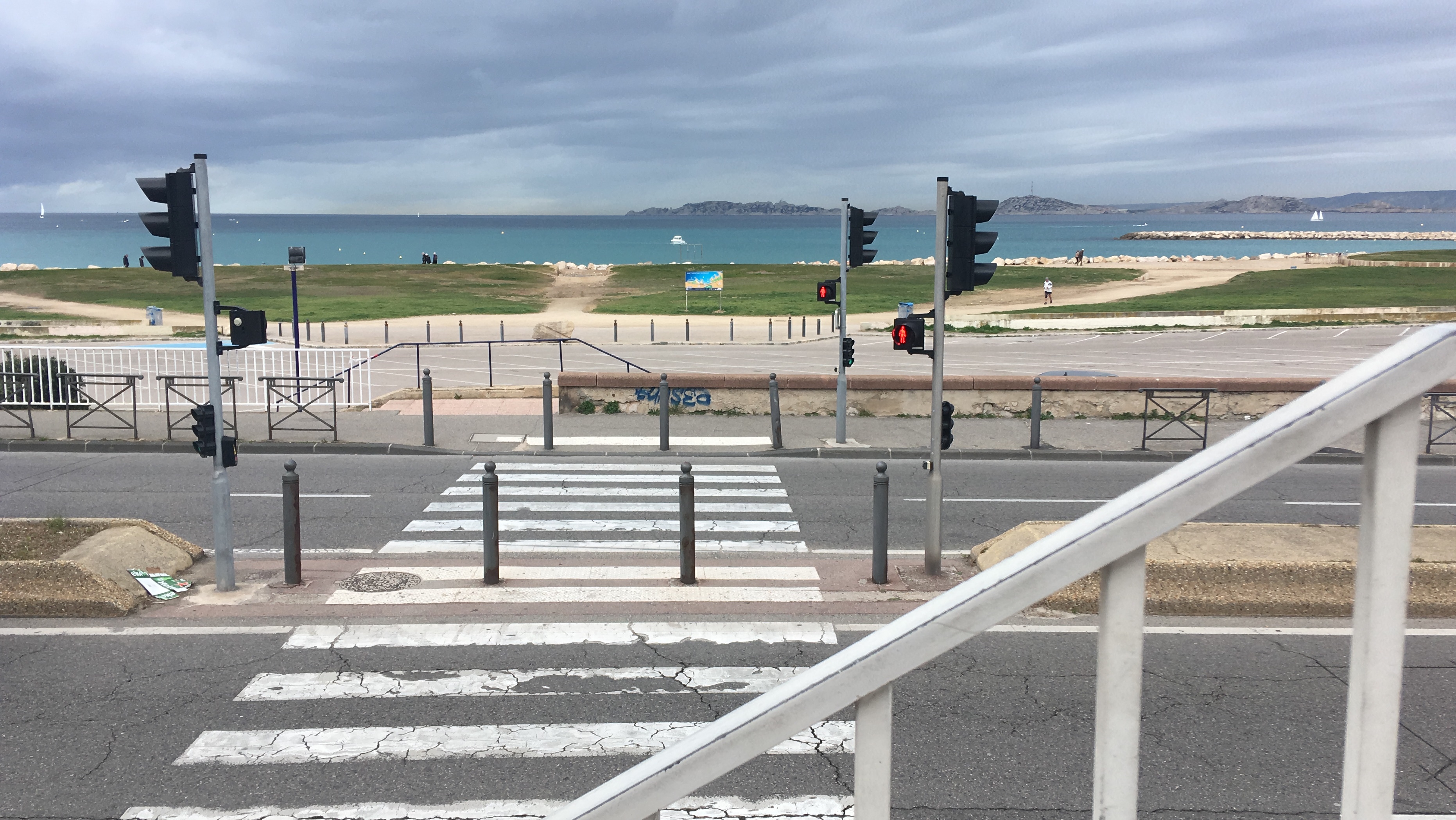 Passage piéton traversant l'avenue Pierre Mendès France à Marseille vers les plages de la pointe rouge.